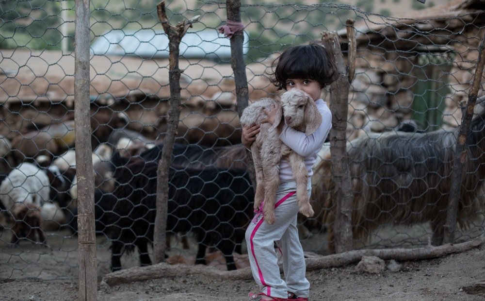 یک دختر ایرانی همراه با یک گوساله در بغل